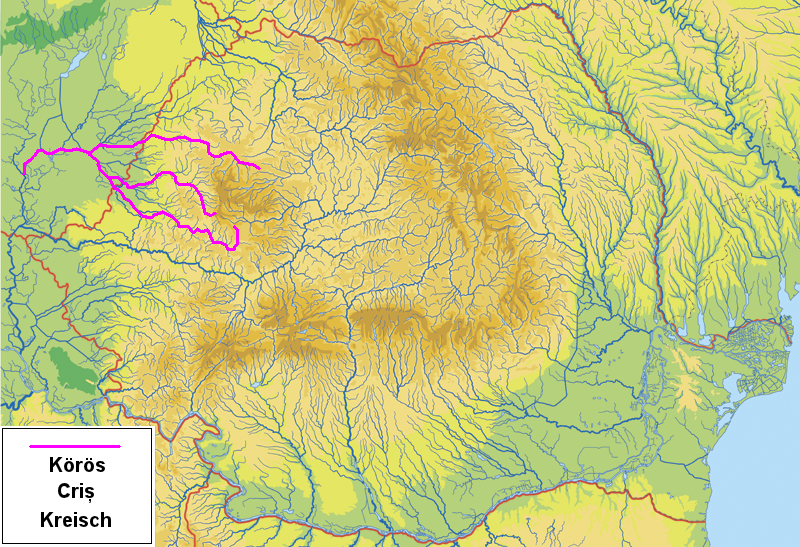 Map of river Körös.